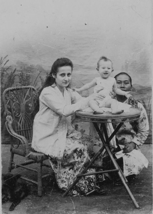 Foto. Potret Anne (mungkin 14 bulan) bersama ibu dan baboenya dengan latar belakang gambar bunga.